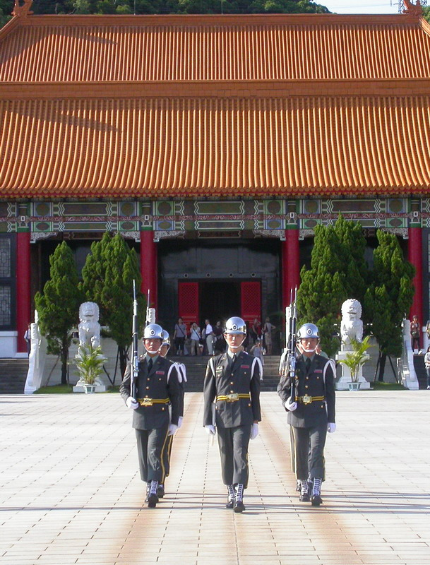 國民革命忠烈祠前的中華民國陸軍儀隊禮兵。